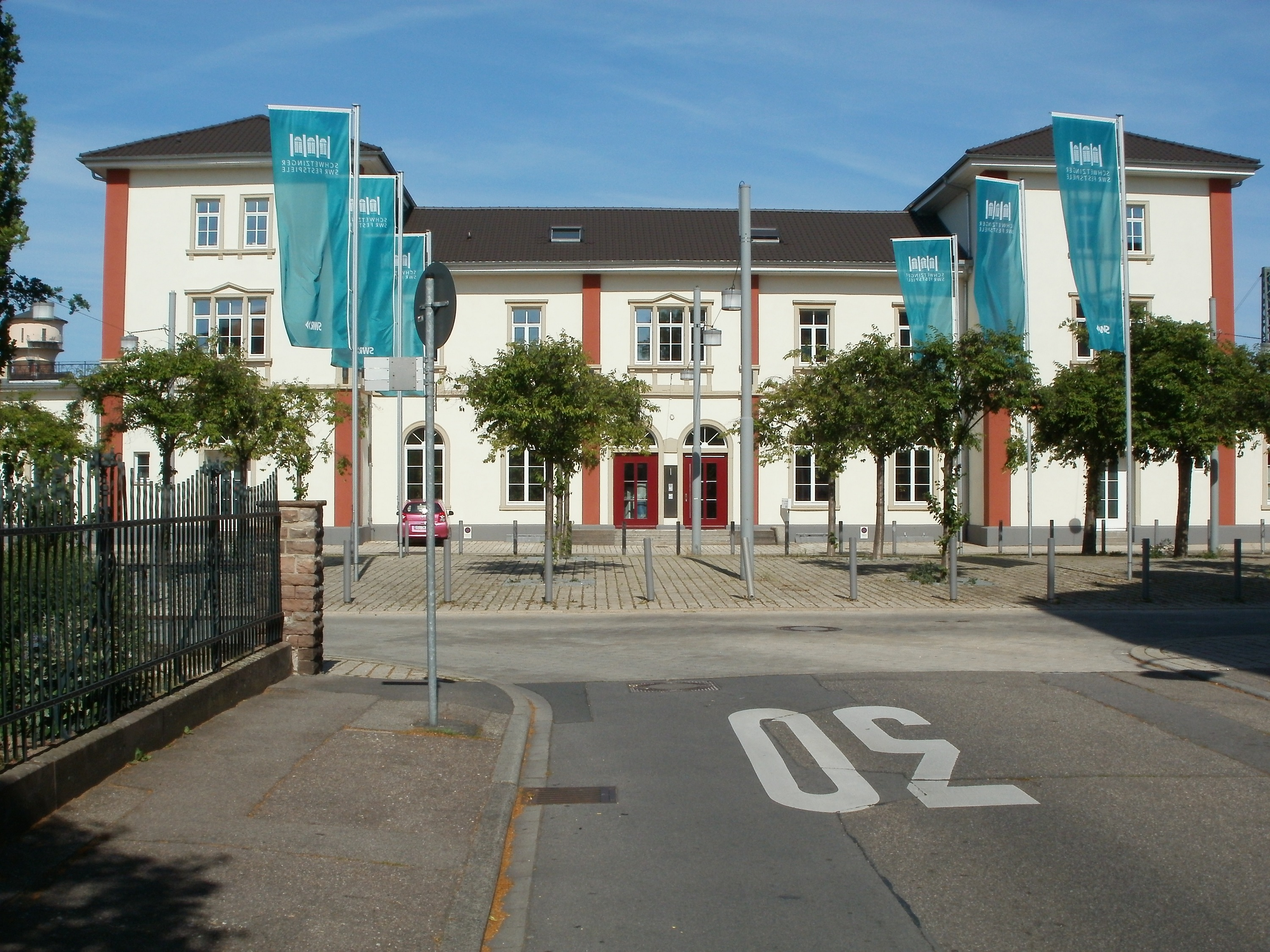 Bahnhof Schwetzingen mit neuem Bahnhofsvorplatz